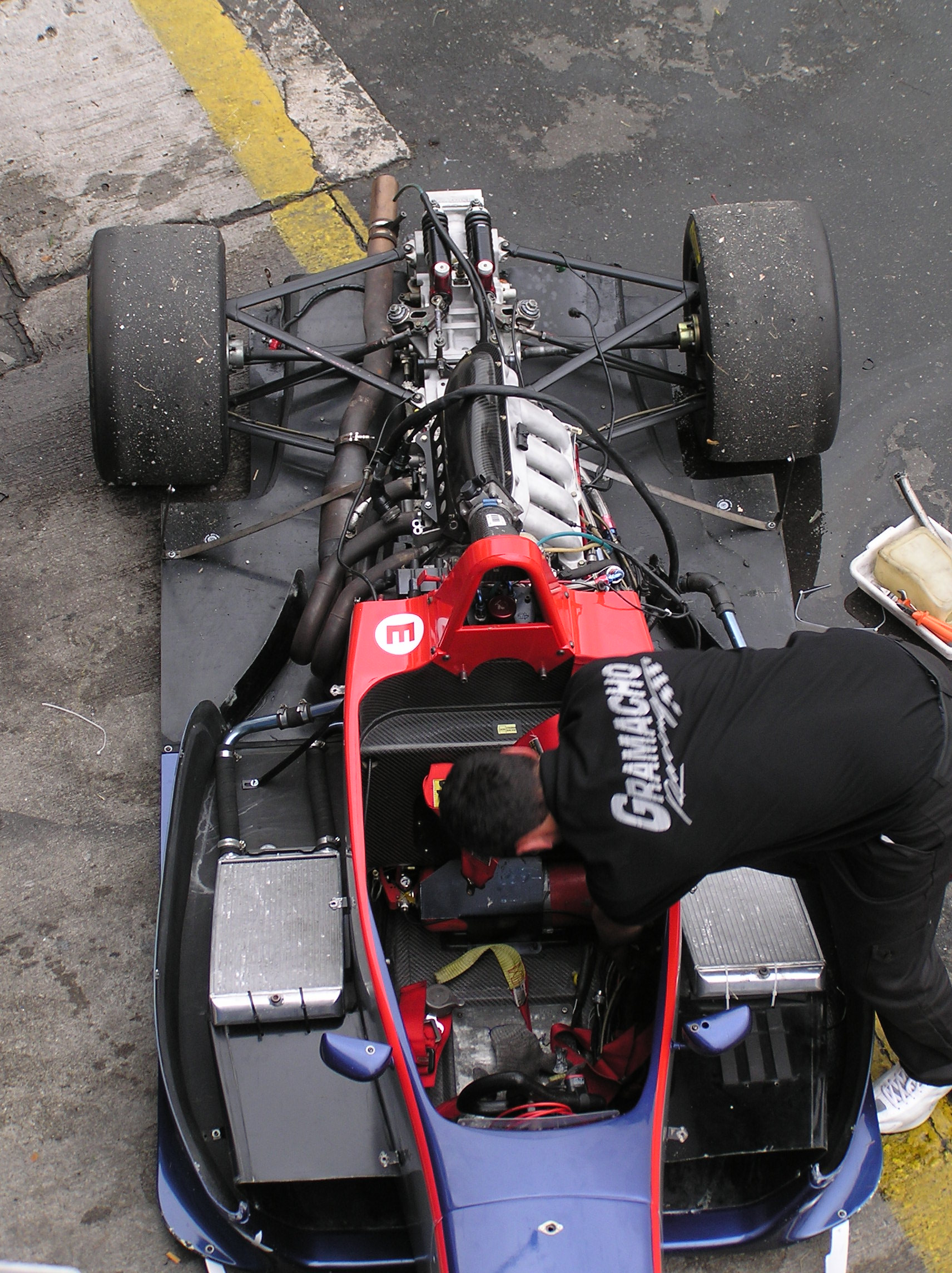 Formula Renault rear